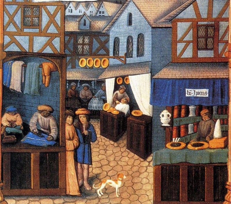 Аптека, парикмахерская, лавки меховщика и портного. Миниатюра. Франция. XV в.